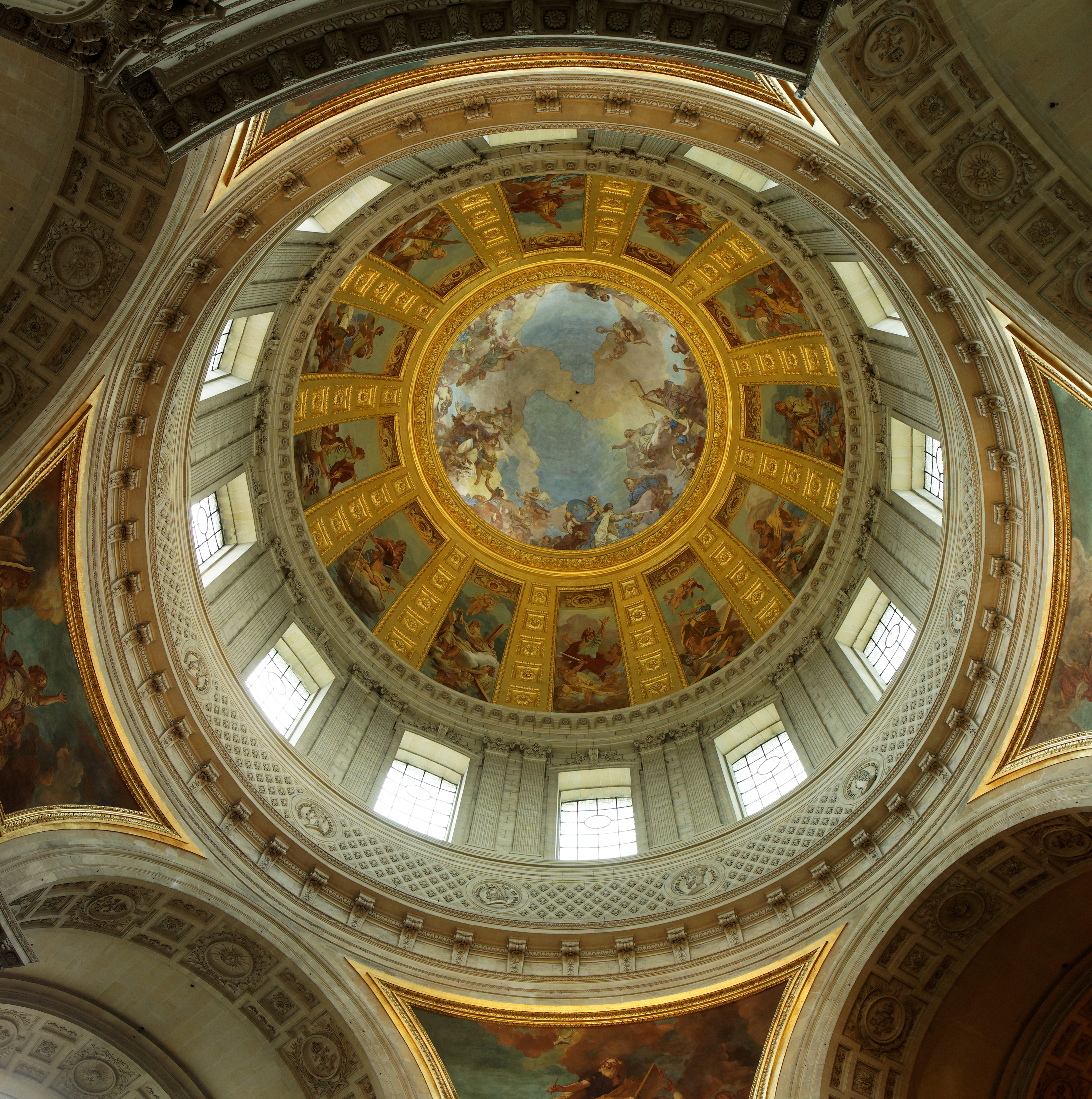 Vue du plafond du dôme des Invalides à Paris